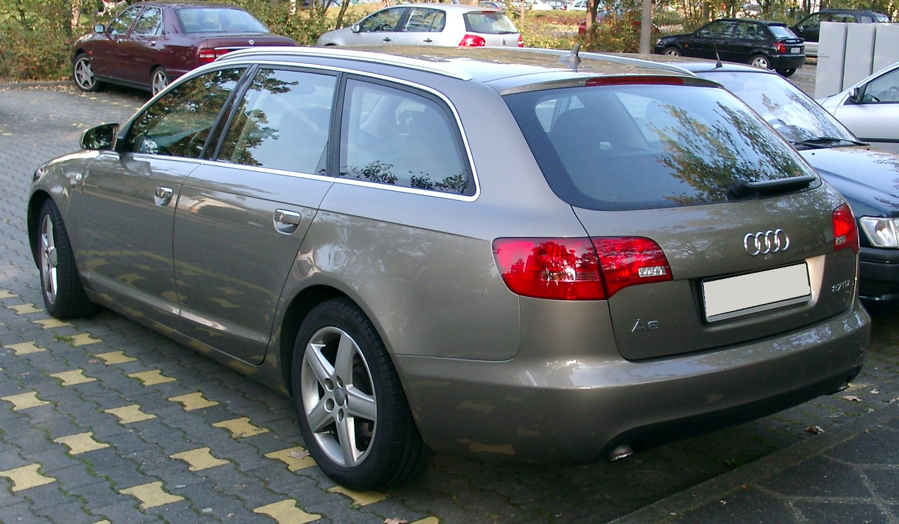 Audi A6 (C6) Kombi